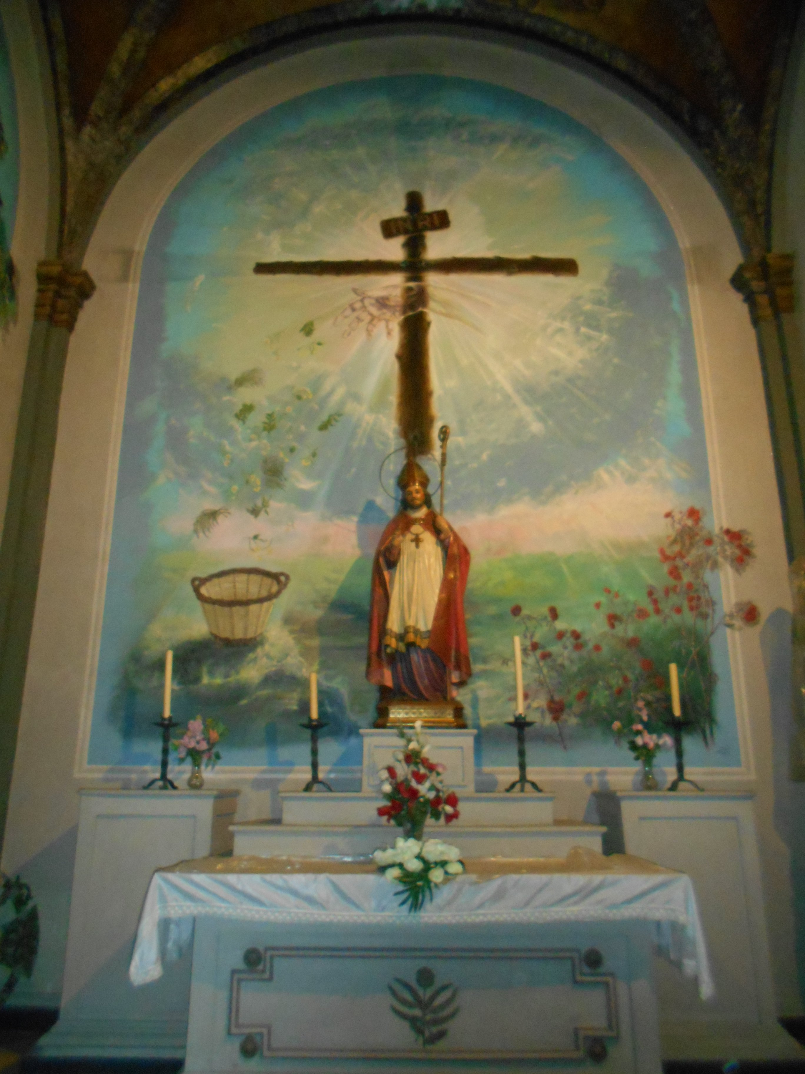 Capilla de San Ponce, iglesia de San Agustín, Barcelona.